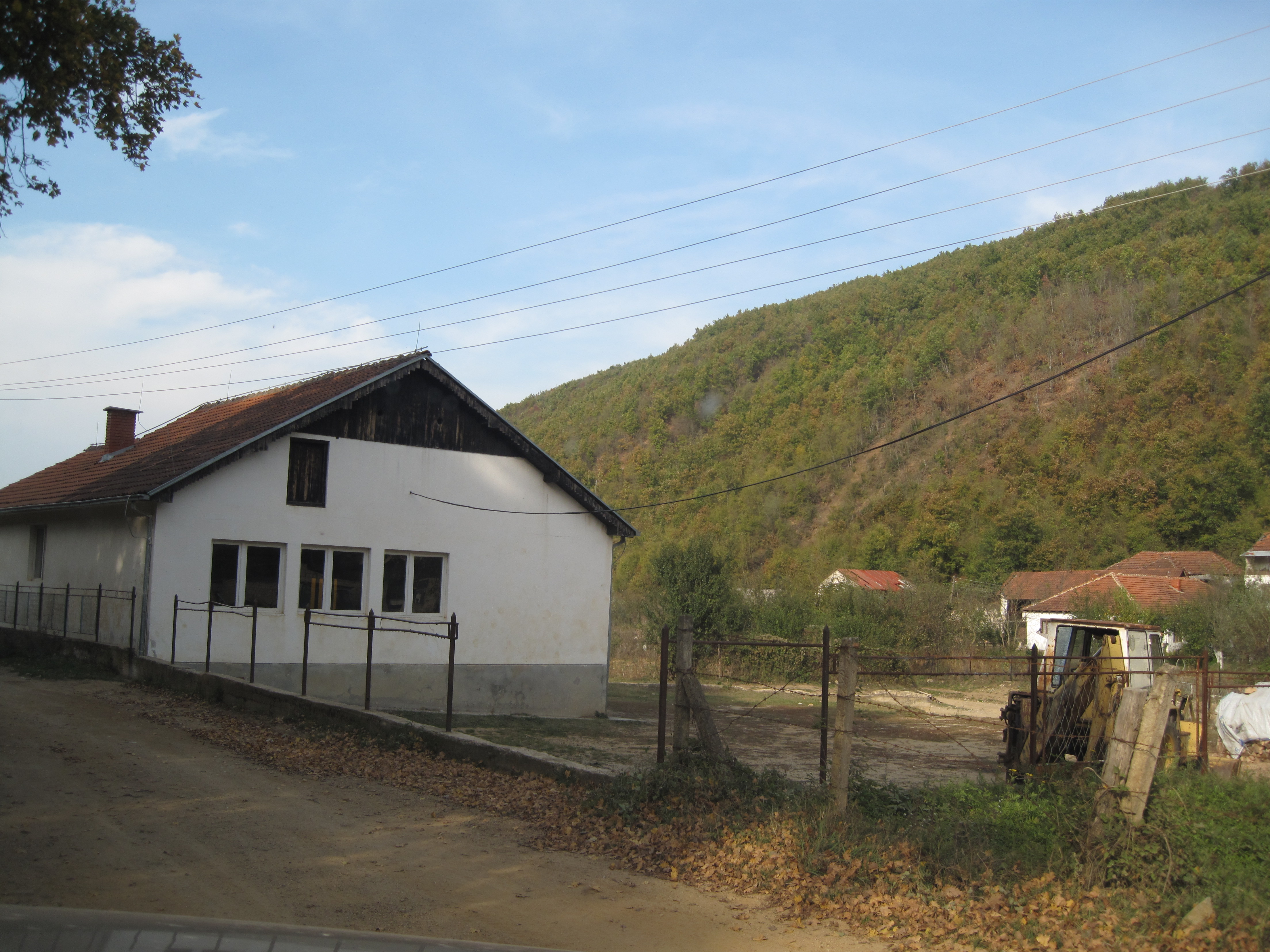 Sllubica -shkolla